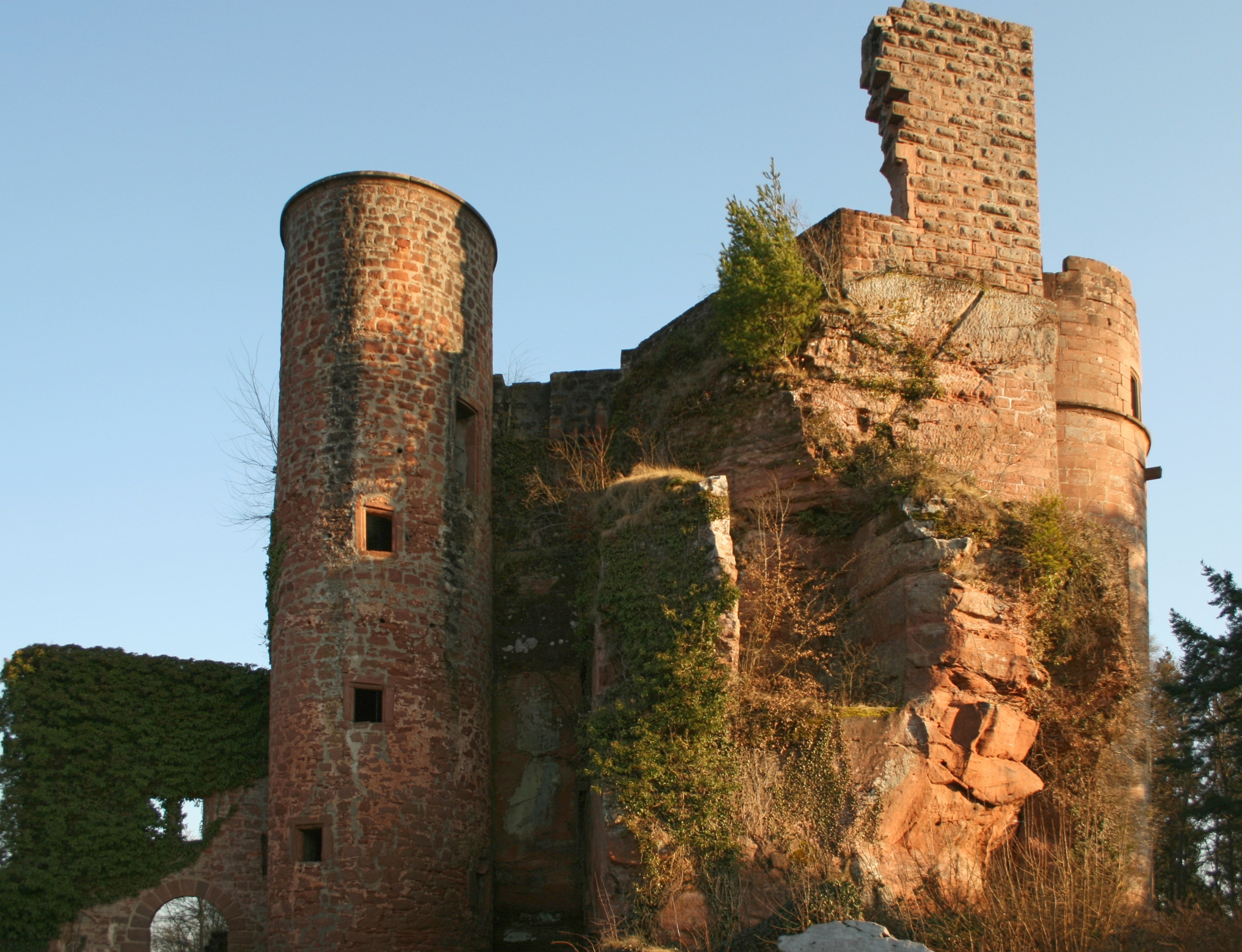 Burg Neudahn, Nordseite. V.l.n.r. Inneres Burgtor,Treppenturm und Reste von Wohnbauten der Oberburg auf dem Sandsteinfelsen.